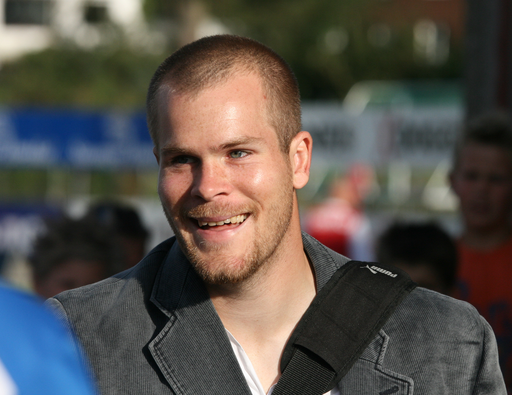 Espen Bugge Pettersen